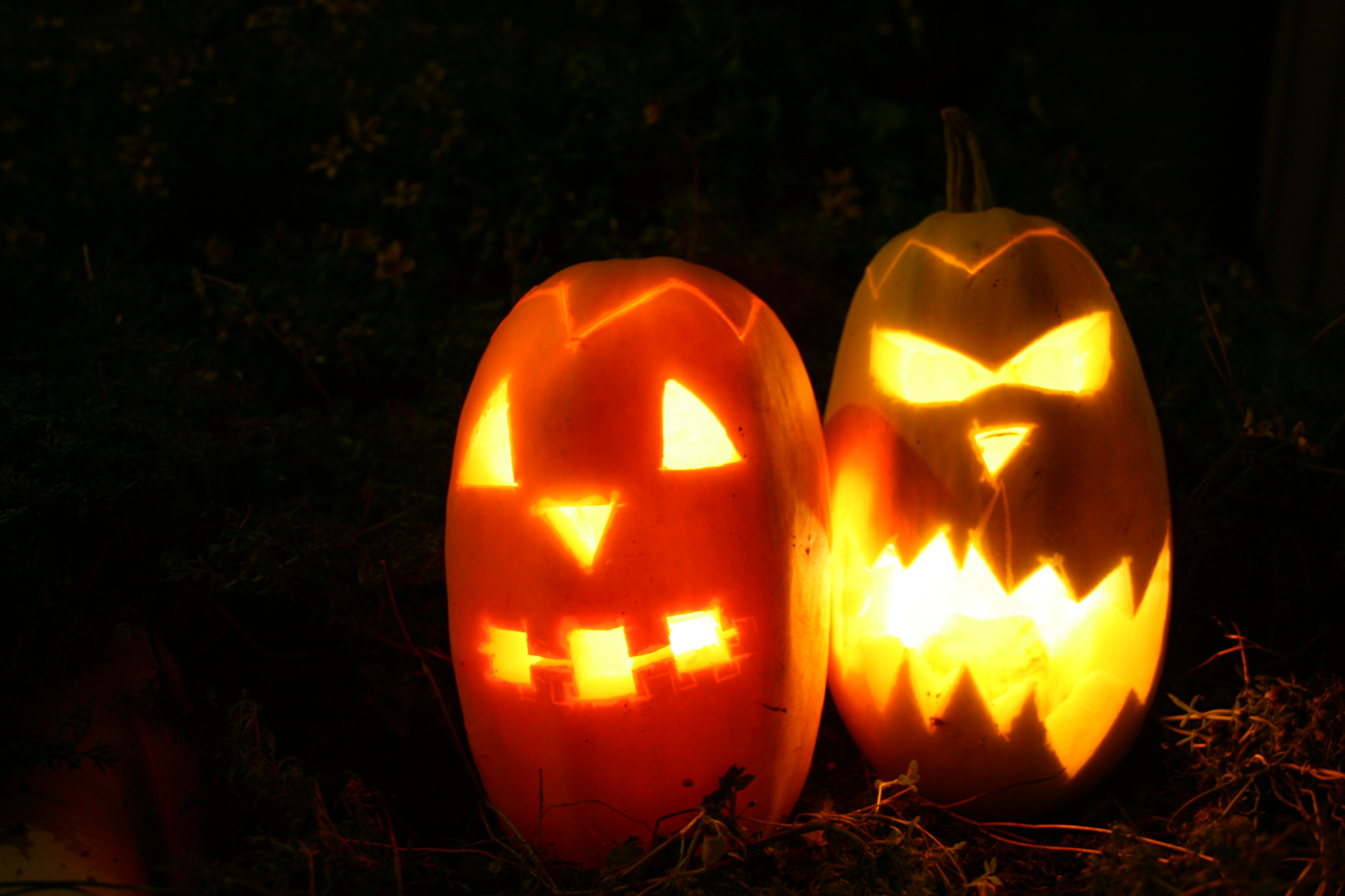 Halloweenkürbisse